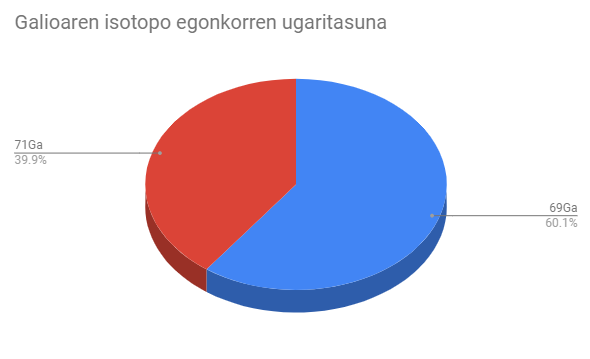 Galioaren isotopo egonkorrek (71Ga eta 69Ga) naturan duten ugaritasuna adierazten duen grafikoa.